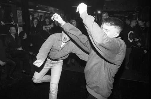 Rockabillys im Tanzcafe LiBella, Altenmarkt an der Alz